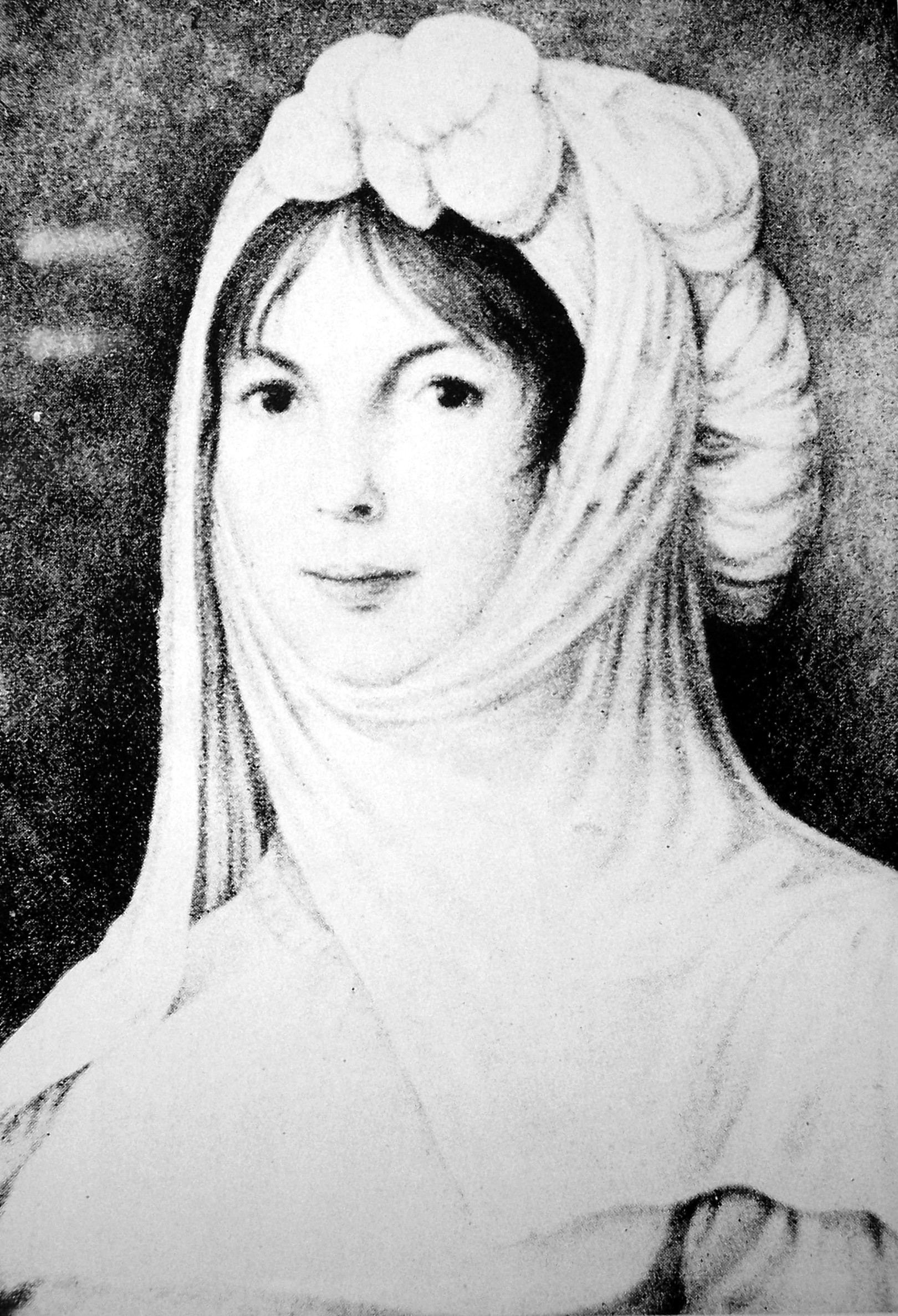 Selbstportrait der Salonnière Elisabeth von Staegemann.